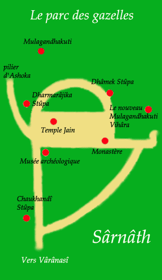 Plan du site de Sârnâth Contents 1 Source 2 Statut 3 Licensing 4 Original upload log Source Shiva-Nataraja Statut 2004, Gérald Anfossi